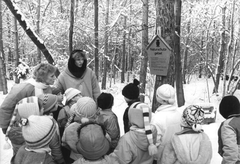 Halle/Saale, Naturkunde für Schüler ADN-ZB Lehmann 2.2.87 Halle: Station junger Techniker und Naturforscher lädt auch im Winter ein- Auch zur Winterzeit bietet die Station junger Techniker und Naturforscher "Juri Gagarin" in Halle-Franzigmark den Schülern der Bezirksstadt ein abwechsulungsreiches Programm. Im Mittelpunkt der Arbeit der hier tätigen 11 pädagogischen und 17 technischen Kräfte sthet der Natur- und Umweltschutz. So gibt es 44 Arbeitsgemeinschaften, in denen sich die Jugendlichen u. a. mit Pferdesport und -haltung, Modellbau, Pflanzenbau sowie Umweltschutz beschäftigen können. Zu den bevorstehenden Winterferien bietet die Station ein detailliertes Programm für die aktive Feriengestaltung.